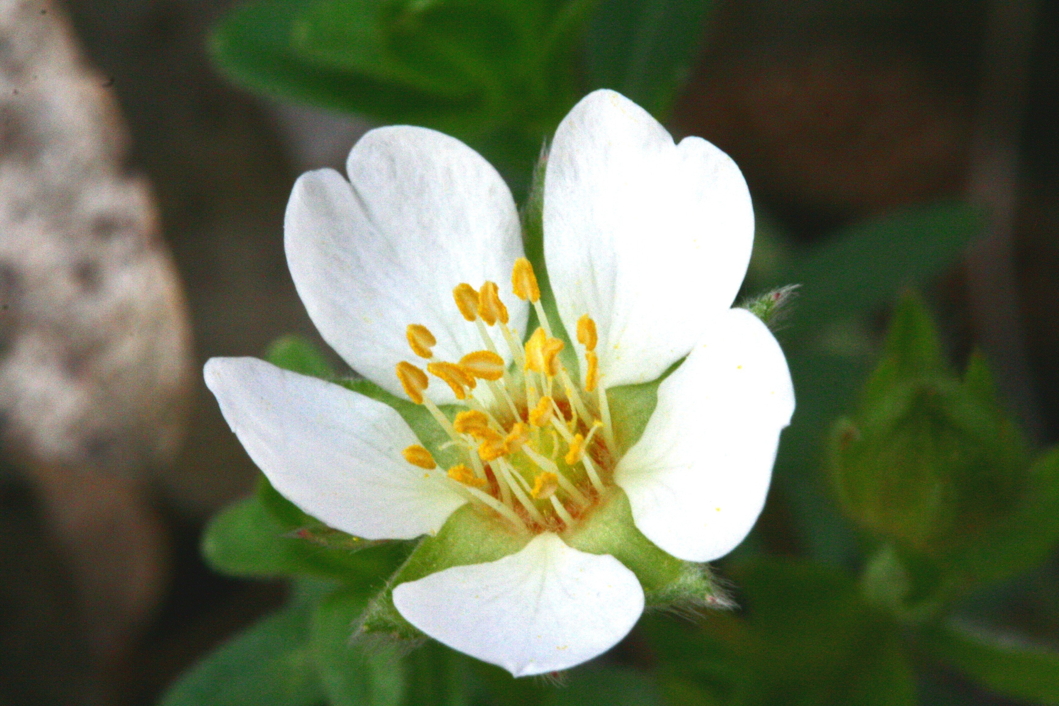 Potentilla_alba (Cinquefoglia bianca) Corlonch, Trichiana (BL), quota 580 m s.l.m.